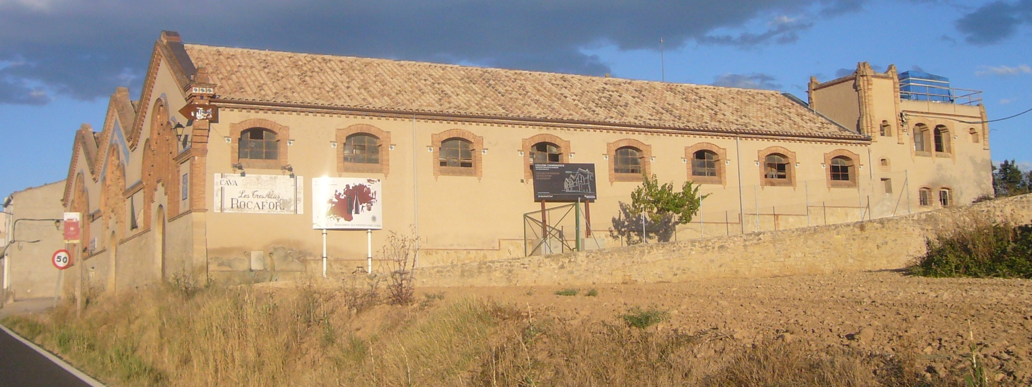 Celler de la Societat Agrícola (Rocafort de Queralt). És una de les anomenades catedrals del vi i un dels més bells exponents dels cellers de Catalunya. Fou construït per Cèsar Martinell el 1918. Destaca el seu interior per l'arc de diafragma i grans arcs parabòl·lics característics de molts cellers de Martinell. Tot l'edifici fou bastit amb parets de maçoneria i maó vist donada l'escassetat de fusta que hi hagué en temps de la Primera Guerra Mundial. Va ser construït en diverses etapes, la primera nau l'any 1918, la segona el 1930 i la tercera el 1948. Exteriorment tenen un basament de maçoneria i un parament superior llis on s'obren els grans finestrals, resolts amb maó vist.